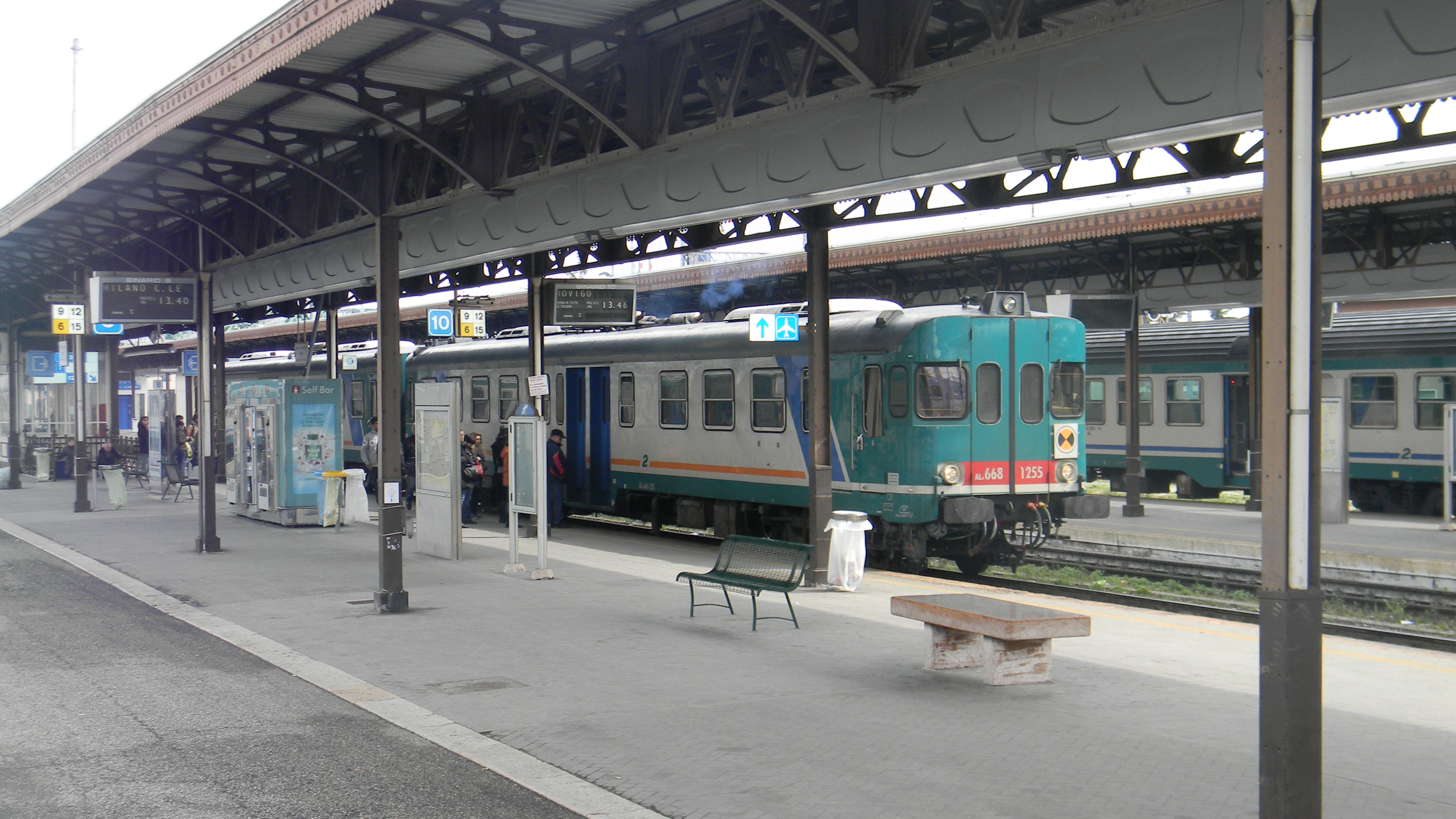 Convoglio ferroviario composto da due automotrici ALn 668.1200, operante il servizio regionale per Rovigo, in sosta alla stazione di Verona Porta Nuova